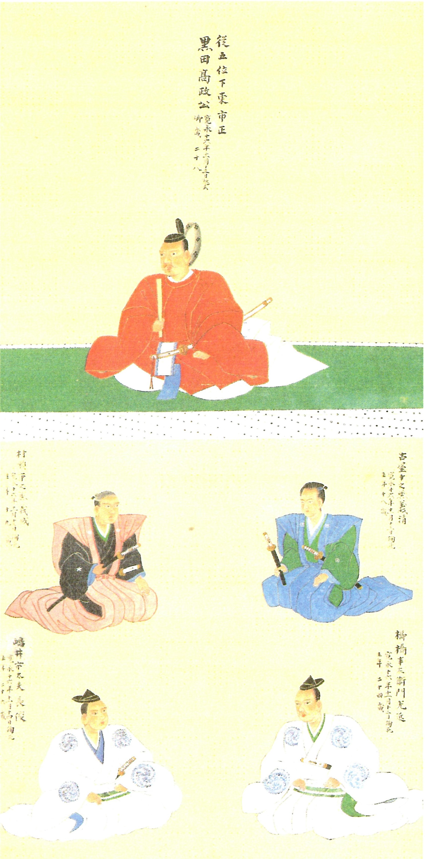 東蓮寺藩主黒田高政の肖像。